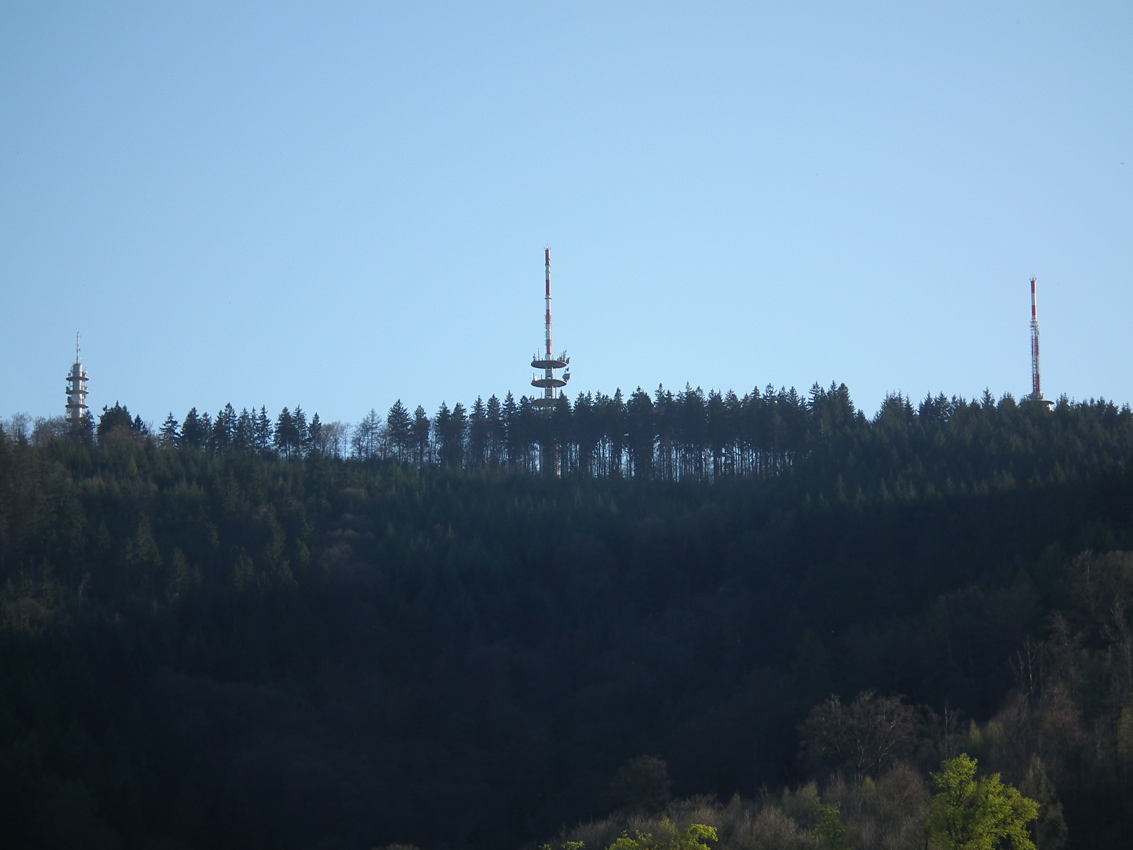 Drei Türme auf dem Heidelberger Königstuhl - von links nach rechts: ehemalige Fernmeldeturm der US-Streitkräfte - Fernmeldeturm der Telekom - Fernsehturm des SWR (Baden-Württemberg, Deutschland)